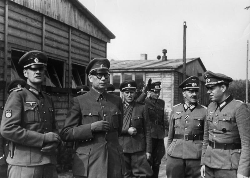 General Wlassow im Kreise von Offizieren.